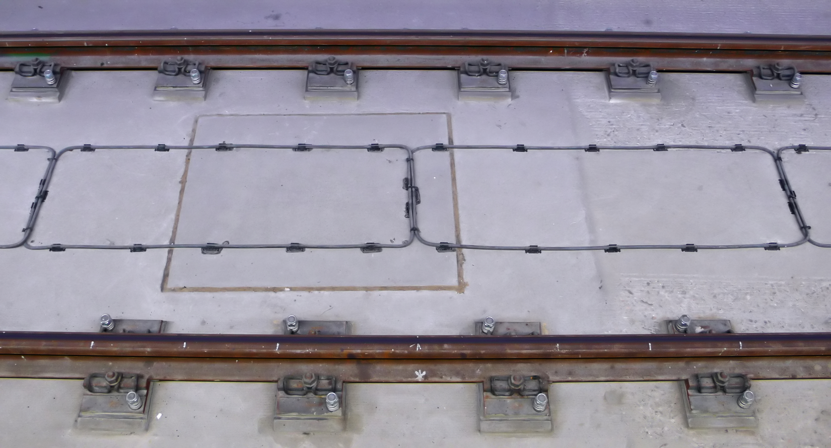 U-Bahn Nürnberg, Linienleiterschleife im Bahnhof Gustav-Adolf-Straße